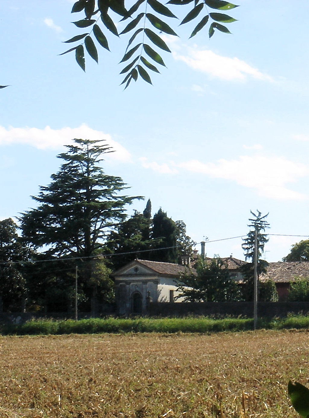 Colle Umberto (Treviso): Villa Morosini Lucheschi Valforte, cappella gentilizia della Madonna di Serravalle.